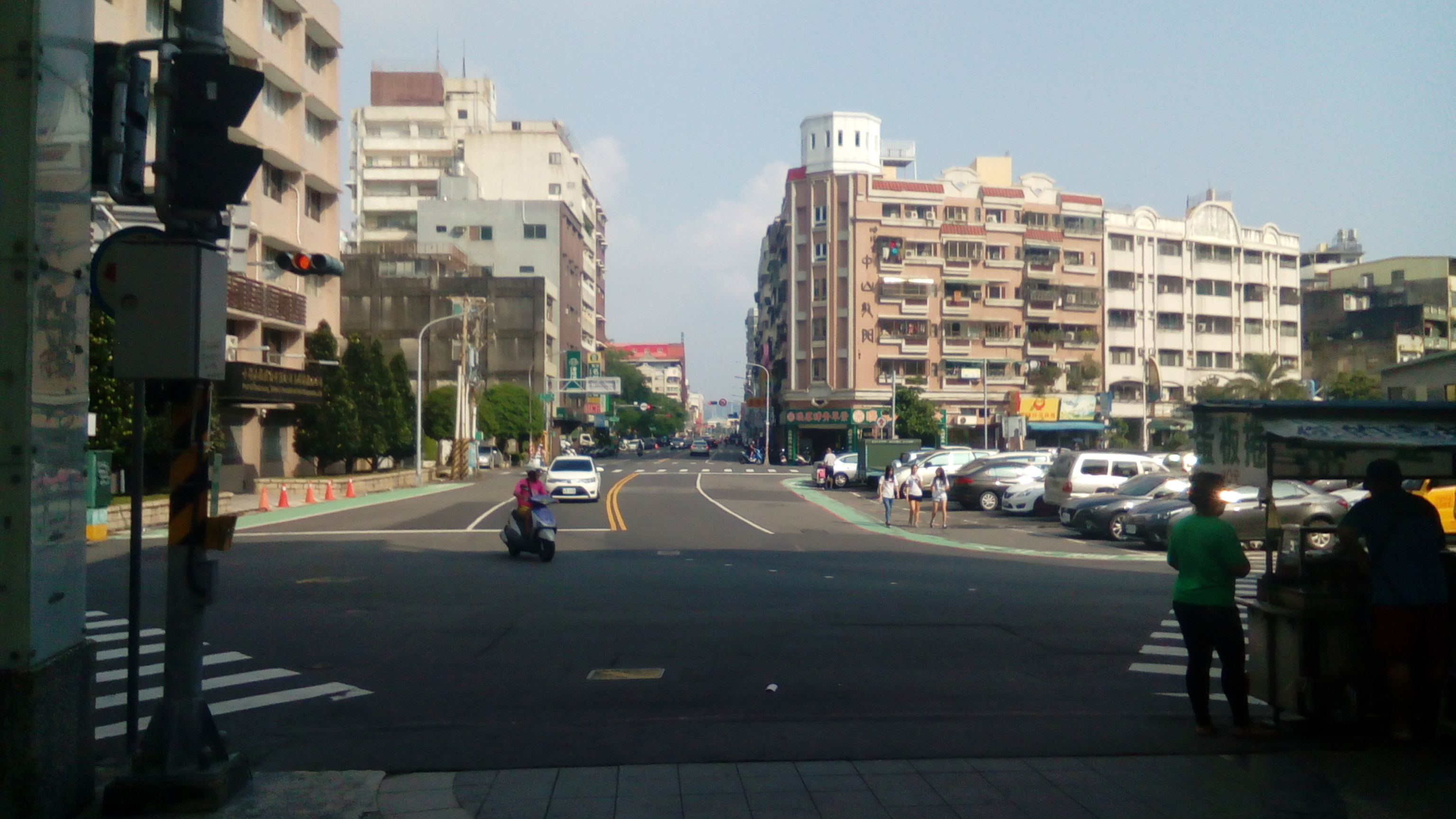 鼓山區臨海路(中山大學隧道前)